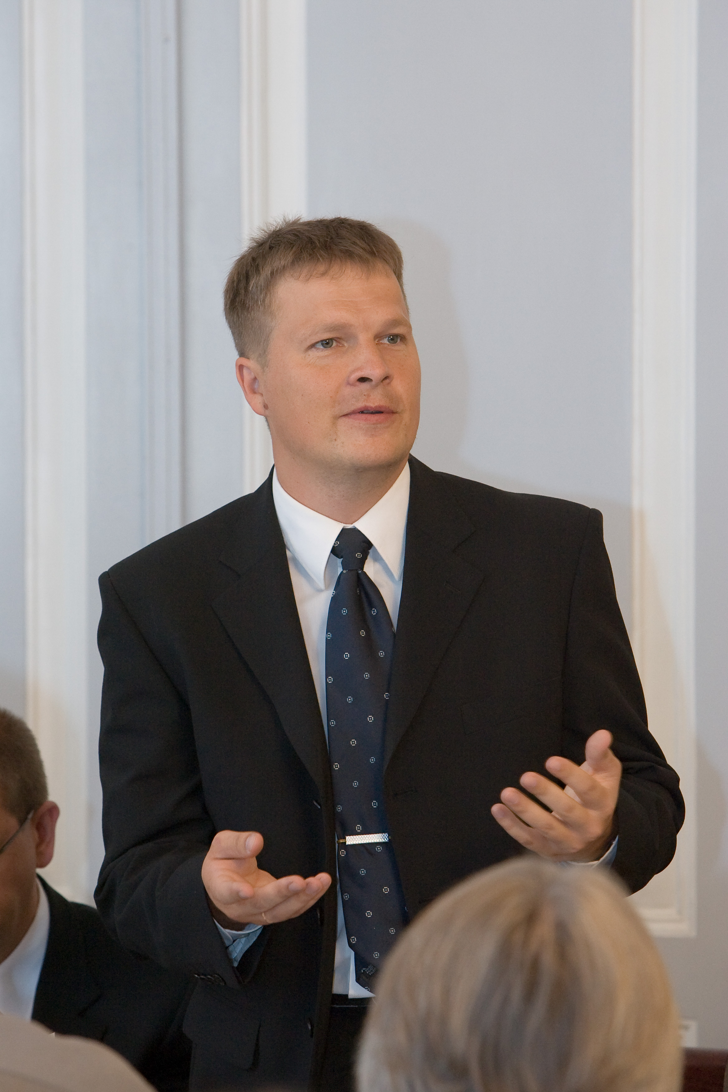 31. augustil 2007 toimus Tartu Ülikooli aulas TÜ rektori professor Alar Karise inauguratsioon, millest võtsid osa Eesti Vabariigi president Toomas Hendrik Ilves, Riigikogu esimees Ene Ergma, peaminister Andrus Ansip, kaitseminister ja TÜ endine rektor Jaak Aaviksoo ning haridus- ja teadusminister Tõnis Lukas. Tartu Ülikooli Nõukogu istung enne Alar Karise inauguratsiooni. Pildil: TÜ sotsiaalteaduskonna dekaan Eiki Berg.